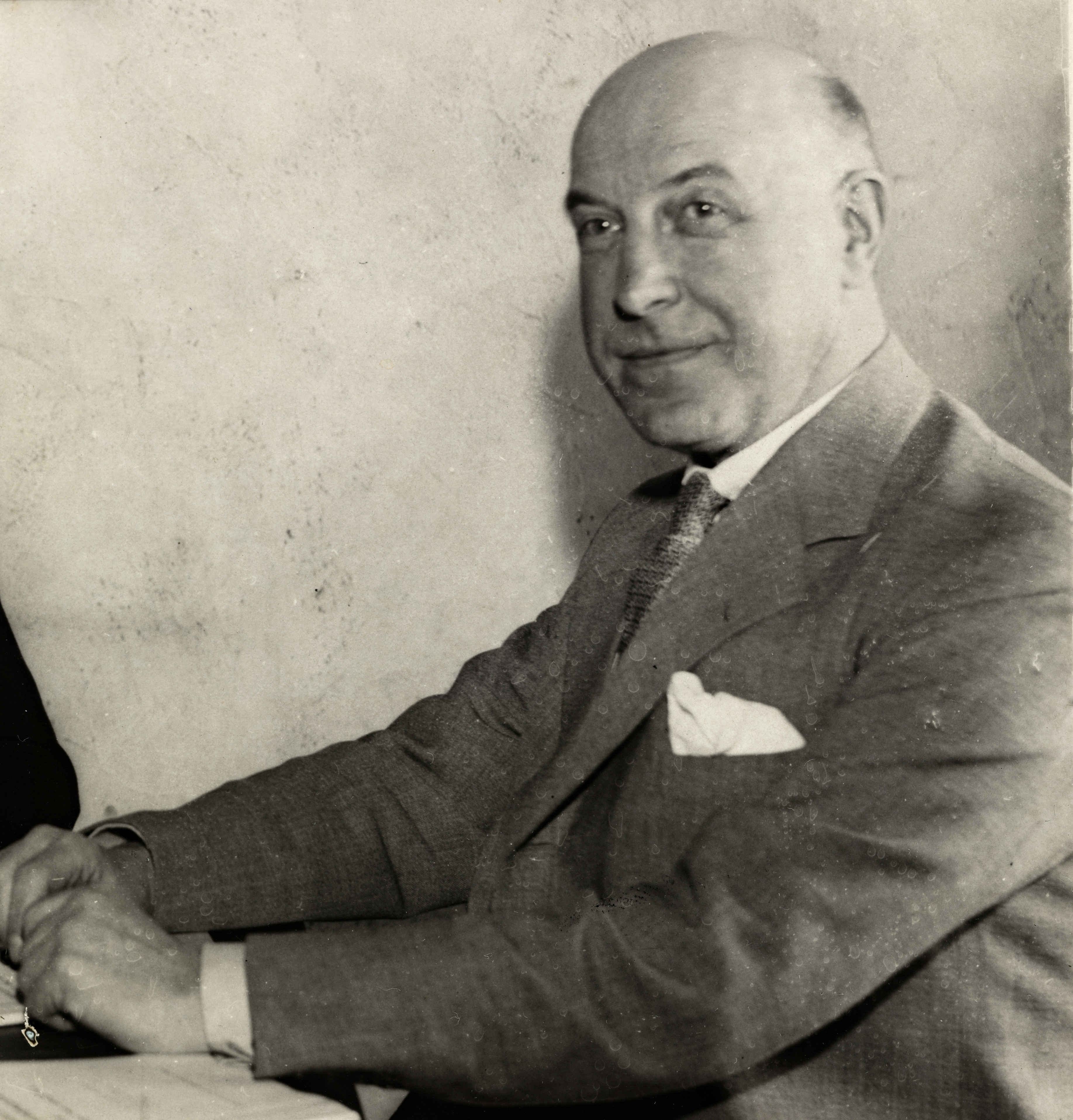 Beskrivelse / Description: Arne Kildal var bibliotekar. Fra 1910-1920 var han sjef for Bergen offentlige bibliotek. Dato / Date: ukjent / unknown Fotograf / Photographer: ukjent / unknown Digital kopi av original / Digital copy of original: s/h papirpositiv Eier / Owner Institution: Nasjonalbiblioteket / National Library of Norway Lenke / Link: Bildesignatur / Image Number: blds_06045